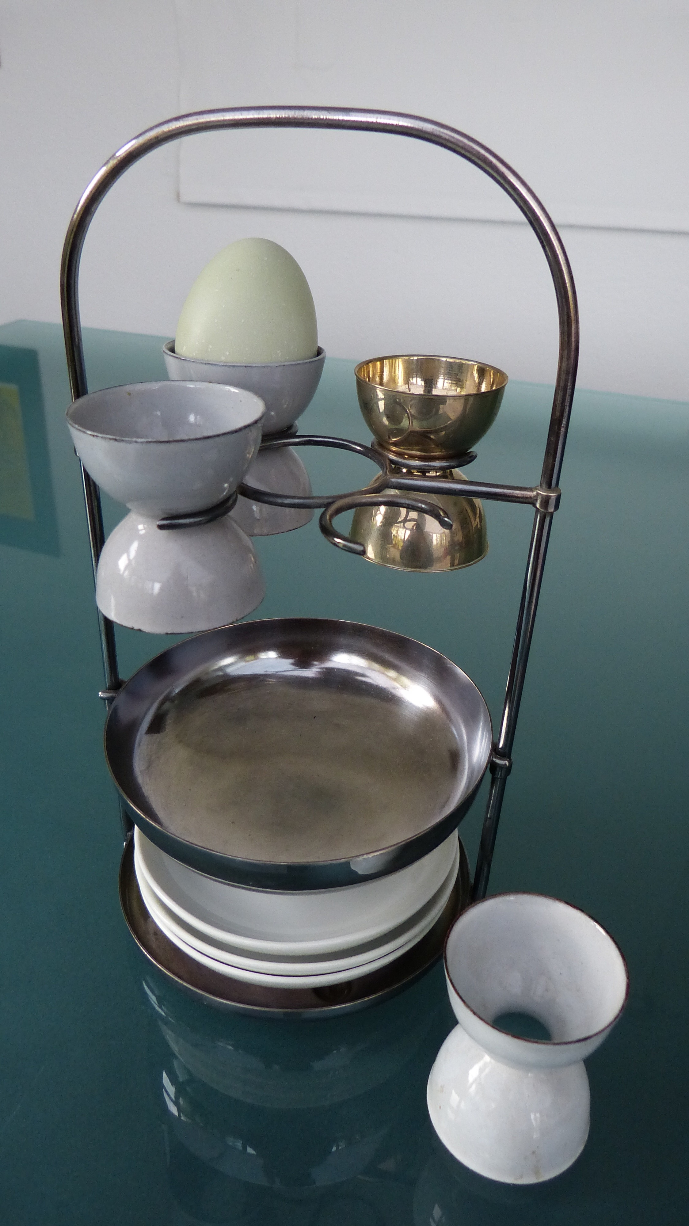 Halterung für Eierbecher, gestaltet 1928 von Erhard und Hans Warnecke in ihrem Atelier in Frankfurt am Main, Email und Stahl